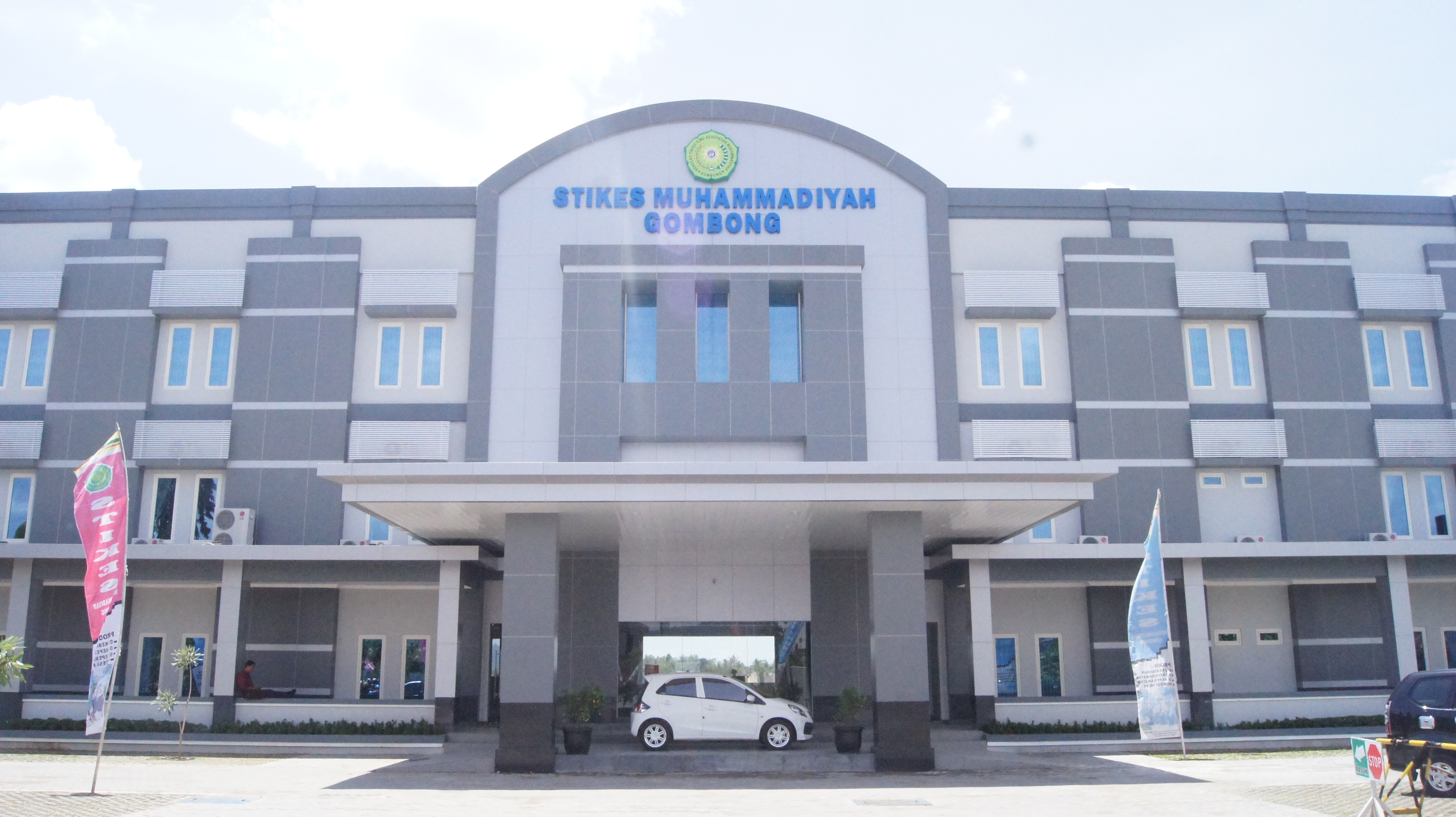 Semondo, Gombong, Kebumen Regency, Central Java, Indonesia